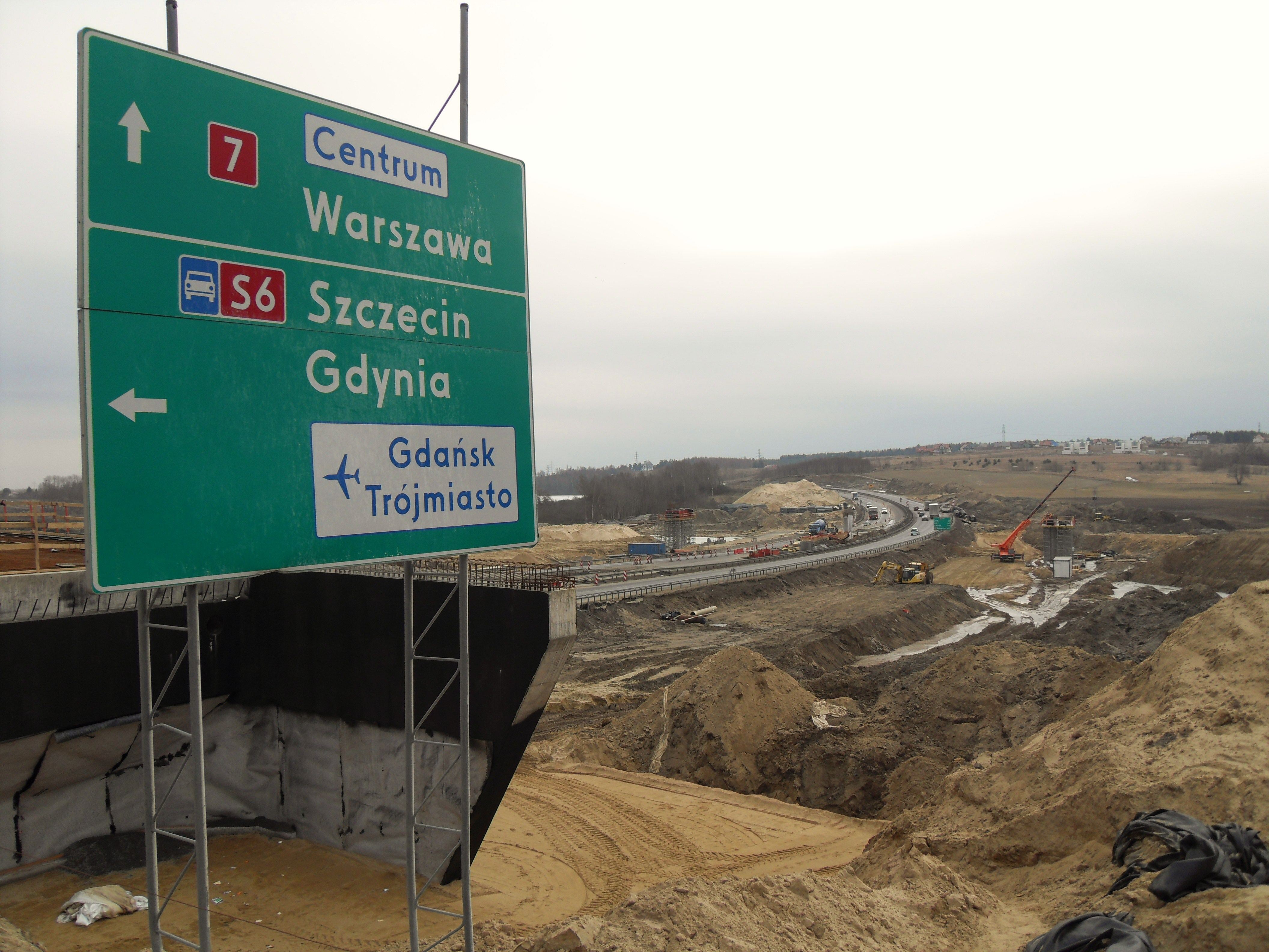 Gdańsk, węzeł Karczemki.